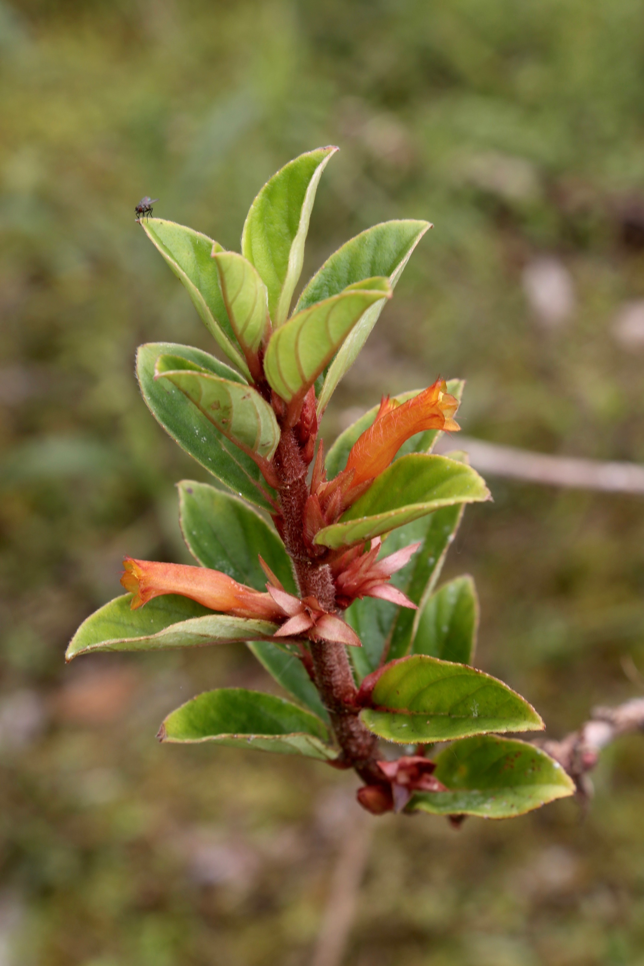 Ecuador, Tungurahua, El Topo, Río Topo.